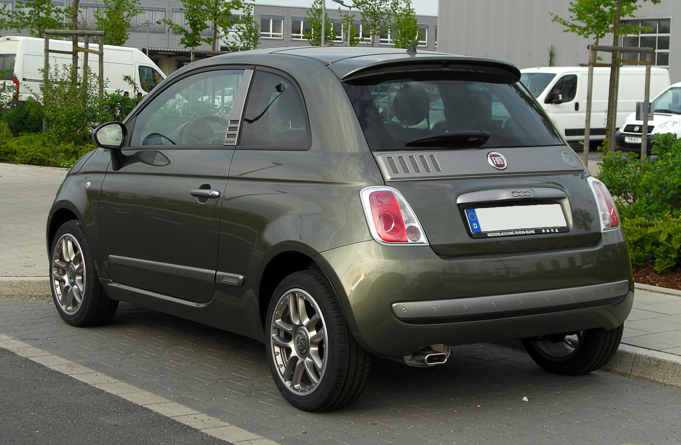 Fiat 500 1.2 8V by Diesel